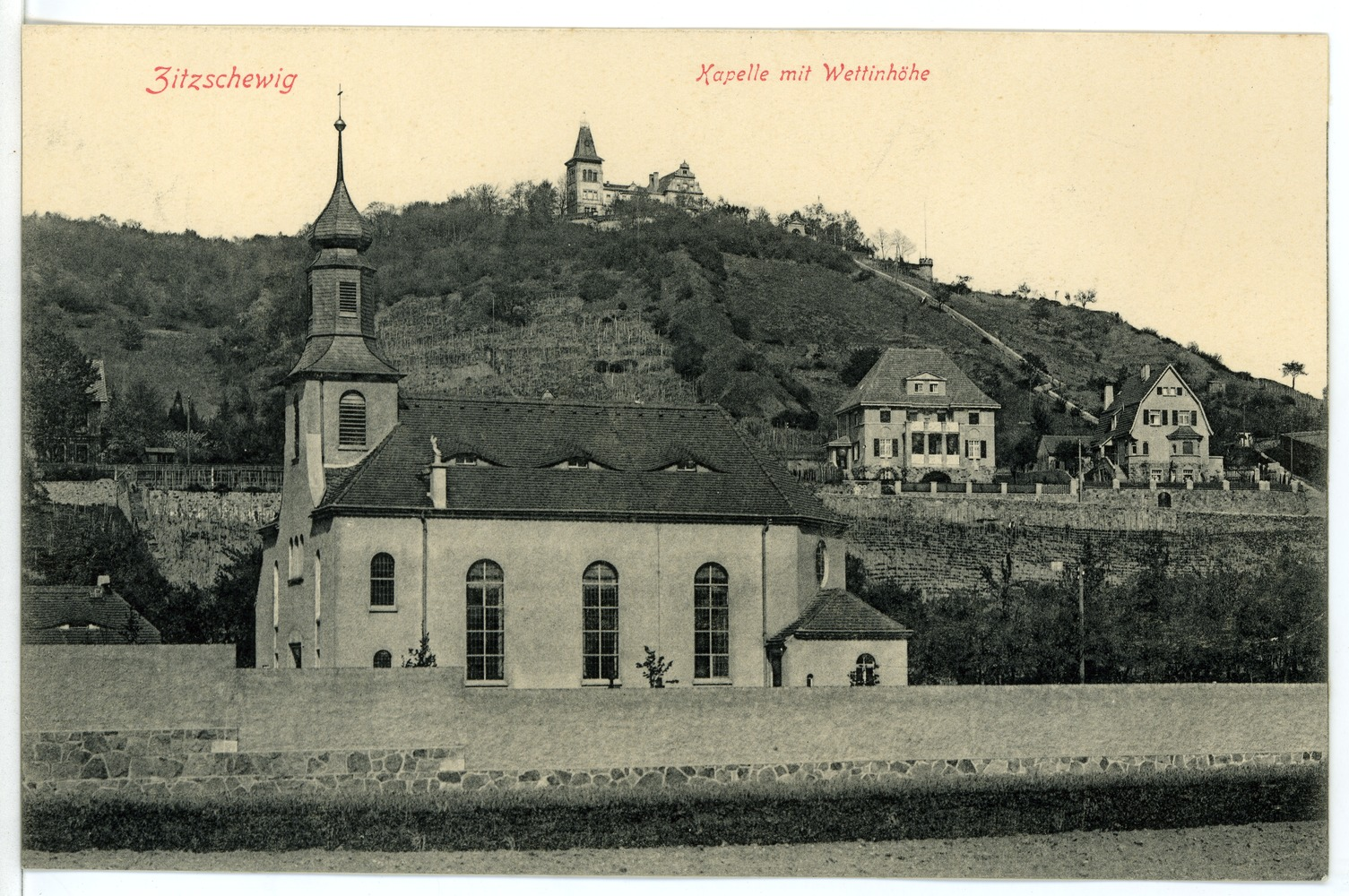 Radebeul; Zitzschewig - Kapelle mit Wettinhöhe This postcard is from publisher Brück & Sohn in Meißen ( postcard has a unique number 15672 and is available in a higher resolution at the publisher. This images was uploaded in a cooperation project between Wikipedians and the publisher.